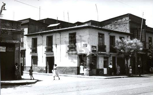 Casa del Pilar de la Esquina de Recoleta, entre la calle Recoleta y Antonia López de Bello.